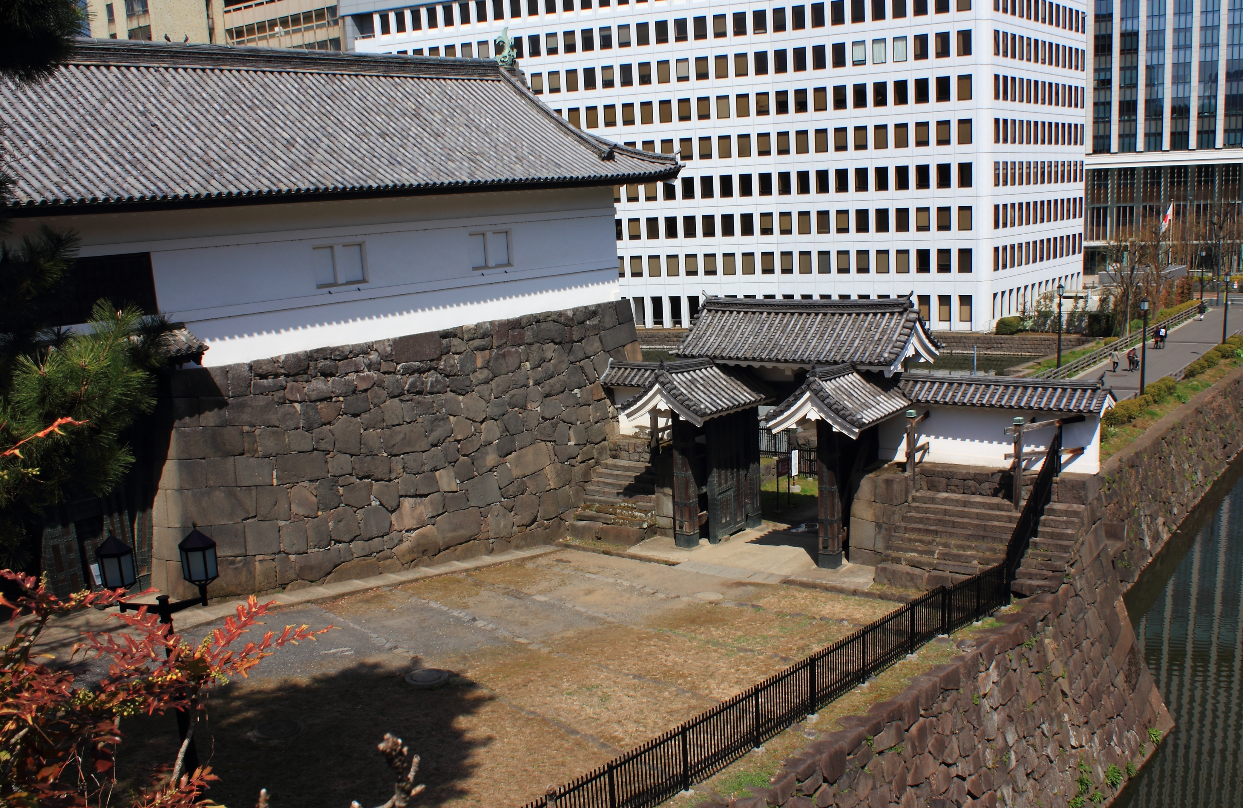 清水門（重要文化財）、東京都千代田区。